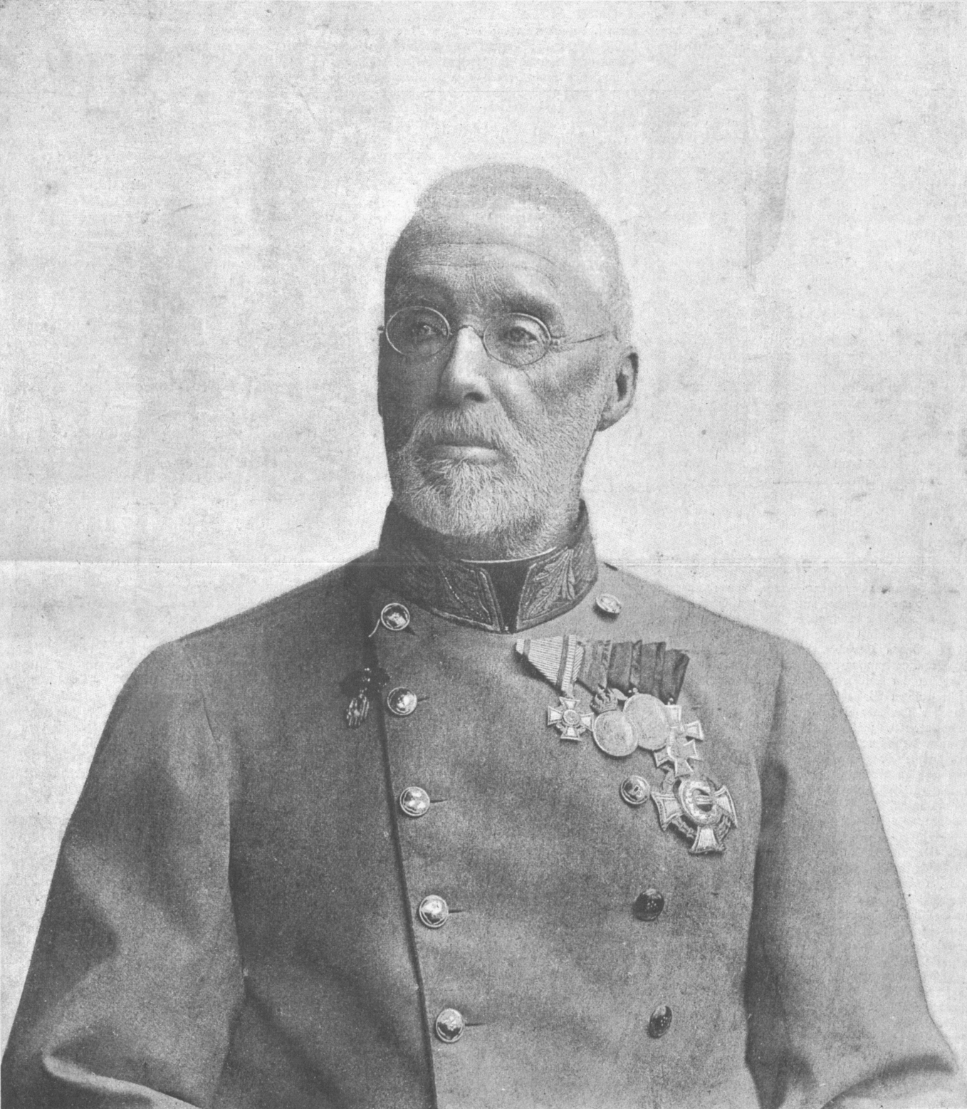 Feldmarschall Erzherzog Albrecht